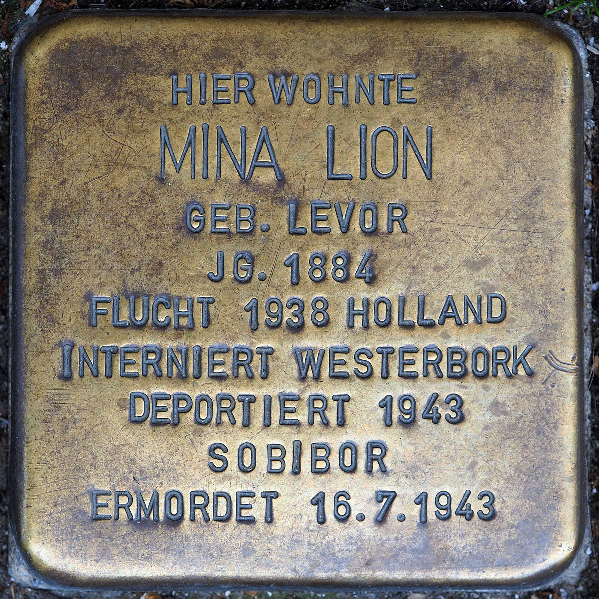 Stolpersteine Wesel: Lion, Mina